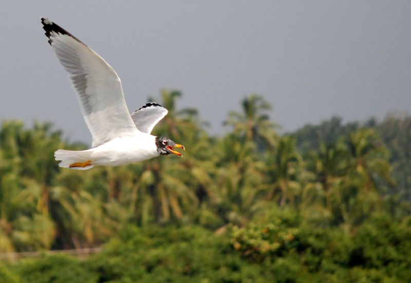 Pallas's Gull Ichthyaetus ichthyaetus adult moulting into summer plumage, Kadalundi Bird Sanctury, Malappuram, Kerala, India